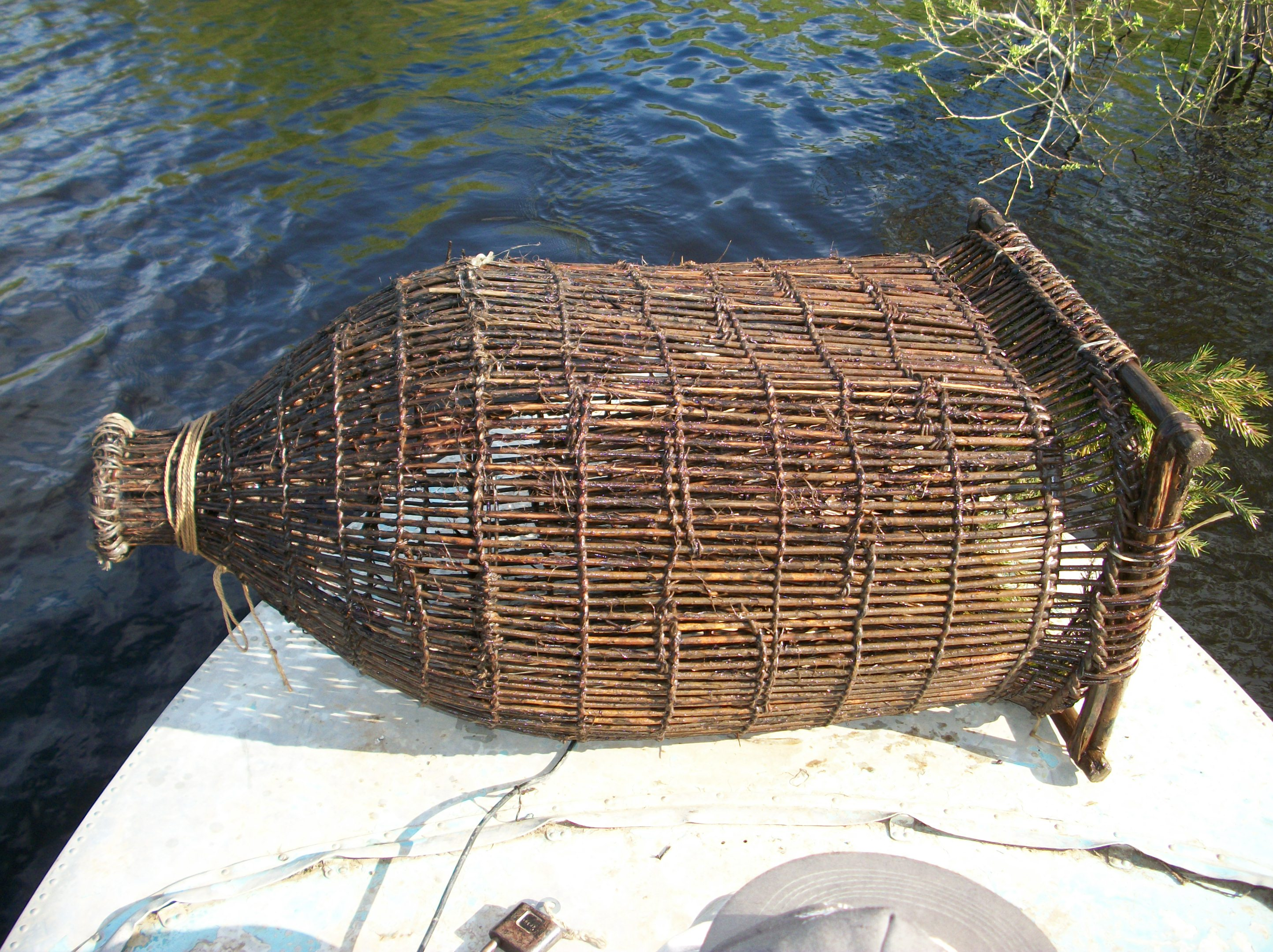 Морда, вытащенная из воды.